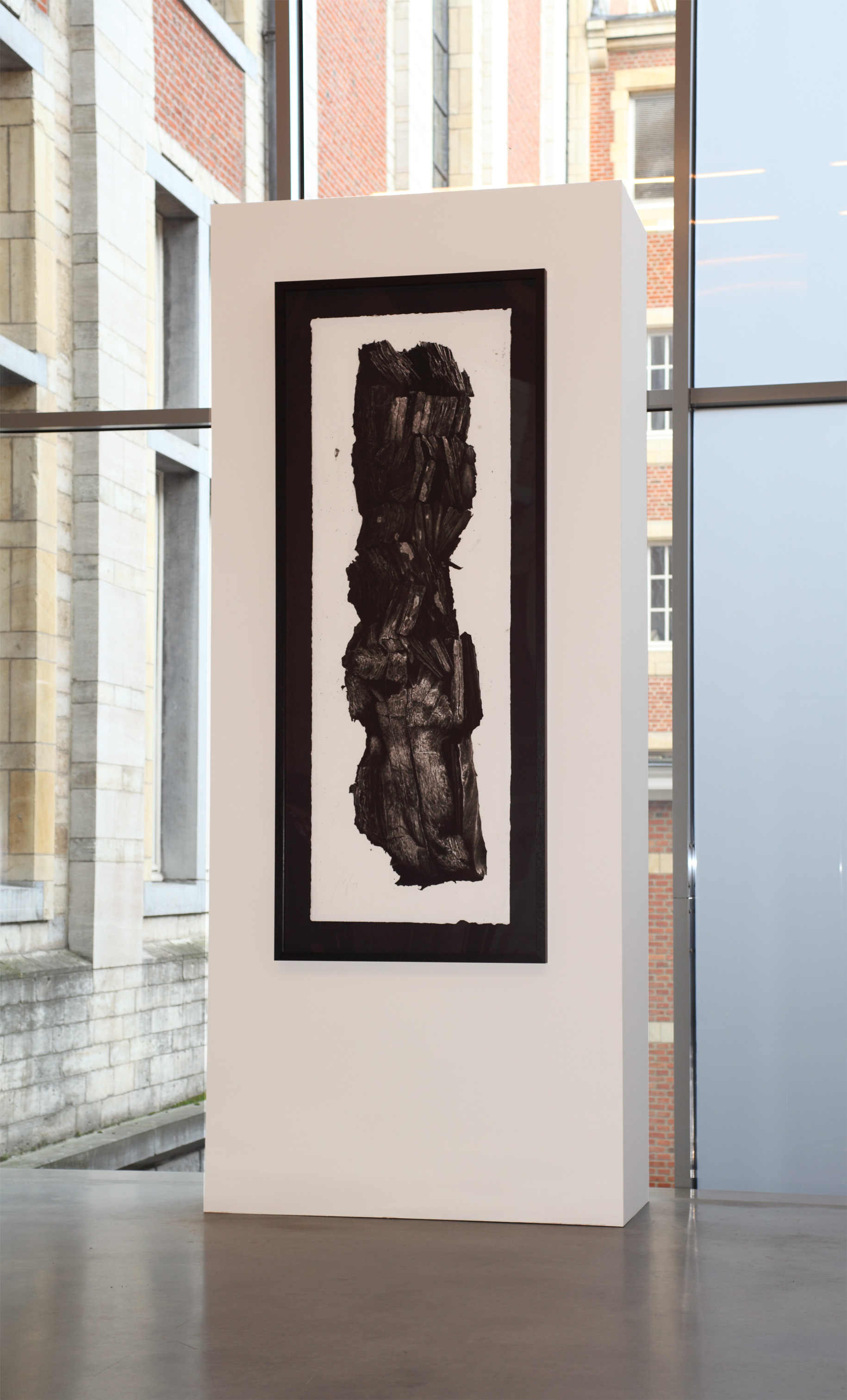 Kunstwerk des Künstlers Hannes Möller